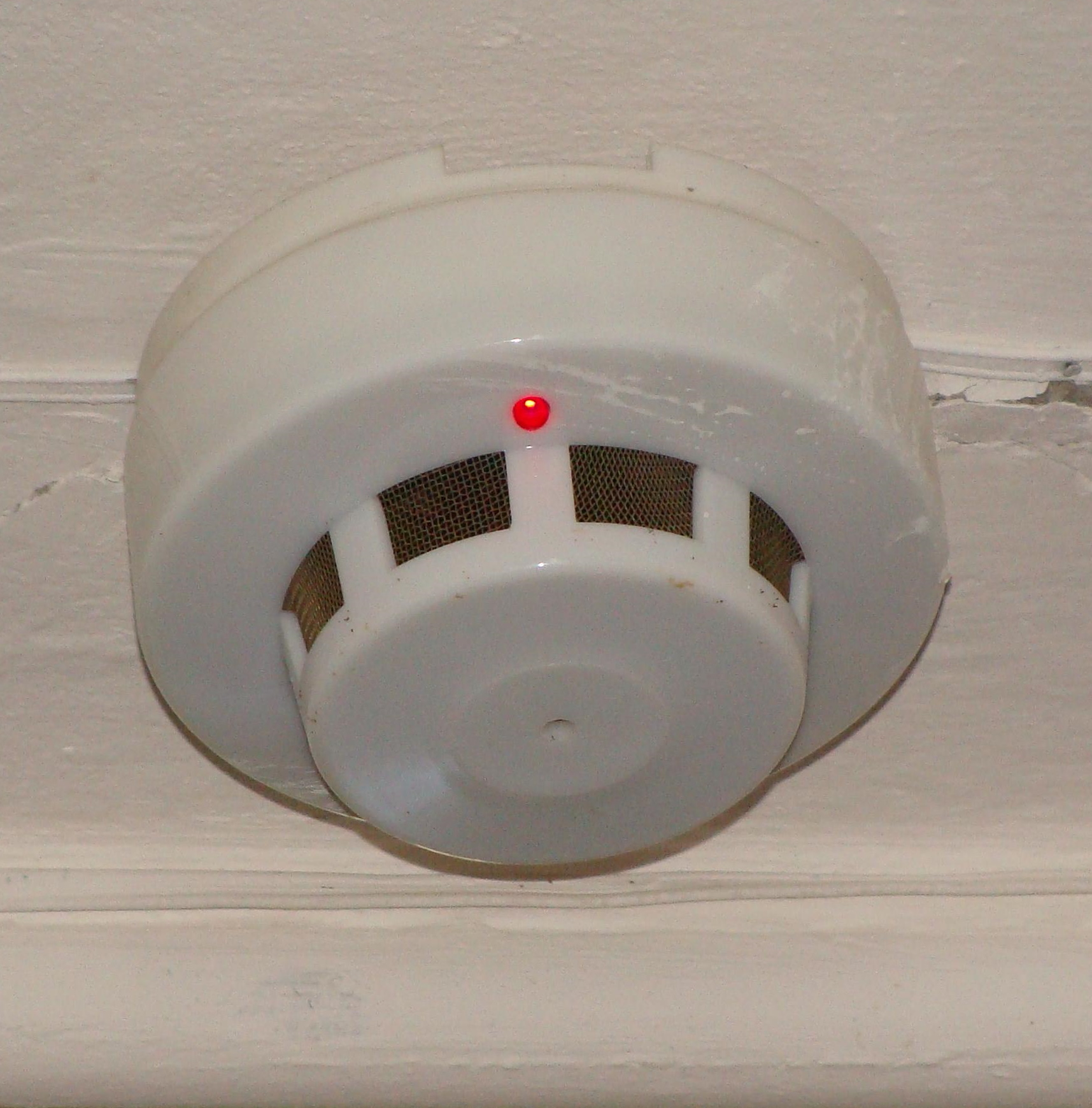 Сработавший дымовой пожарный извещатель